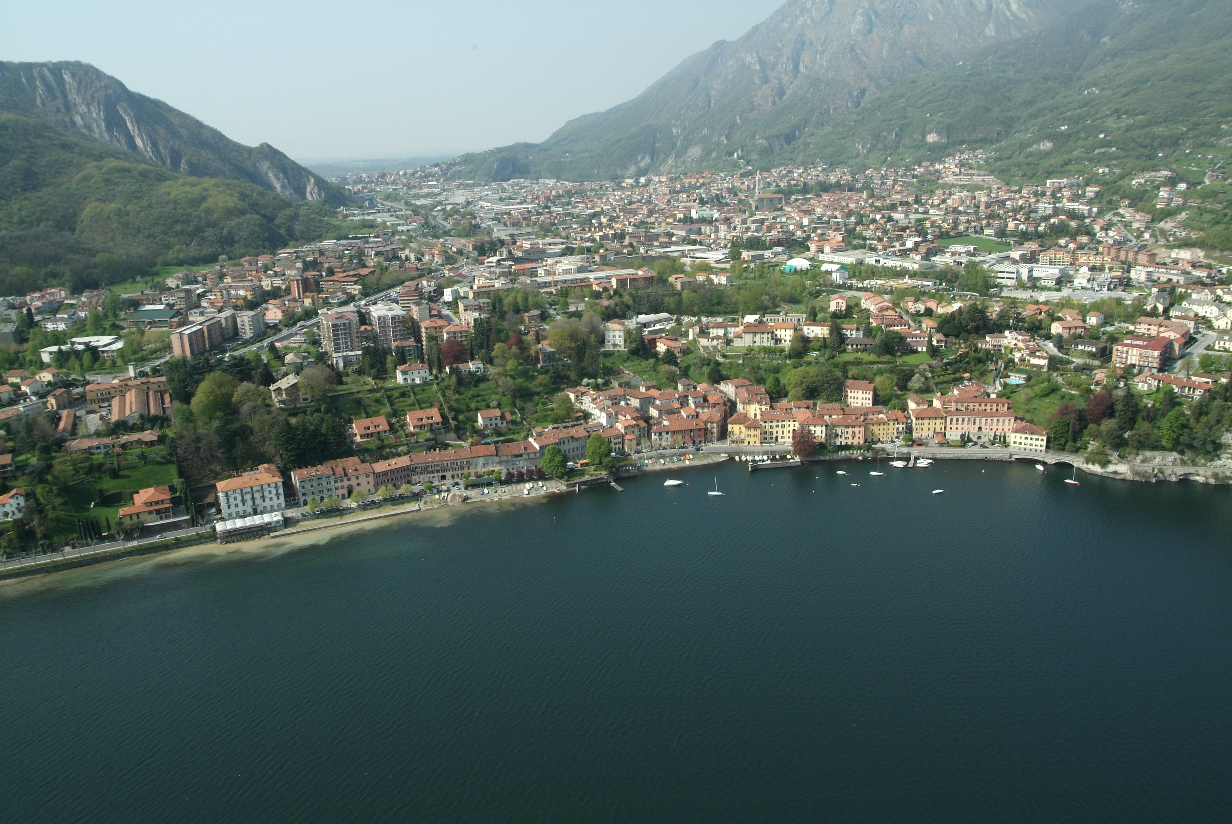 Veduta aerea di Malgrate e della Valle Magrera sullo sfondo